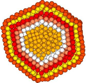 รูปนี้แสดงให้เห็นถึงชั้นย่อยของพื้นผิวในก้อนหกเหลี่ยม